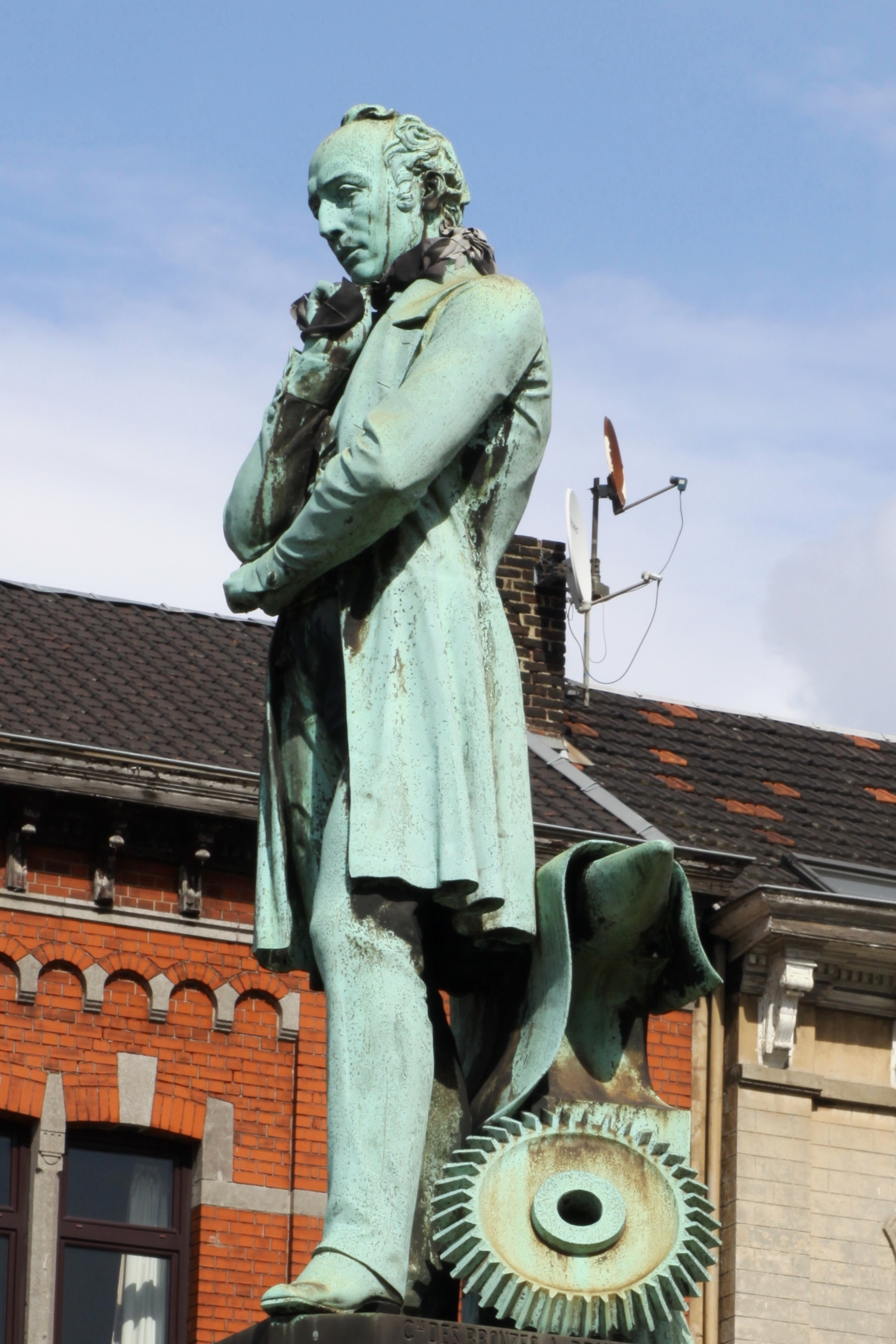 Statu vum John Cockerill zu Seraing virum Stadhaus.